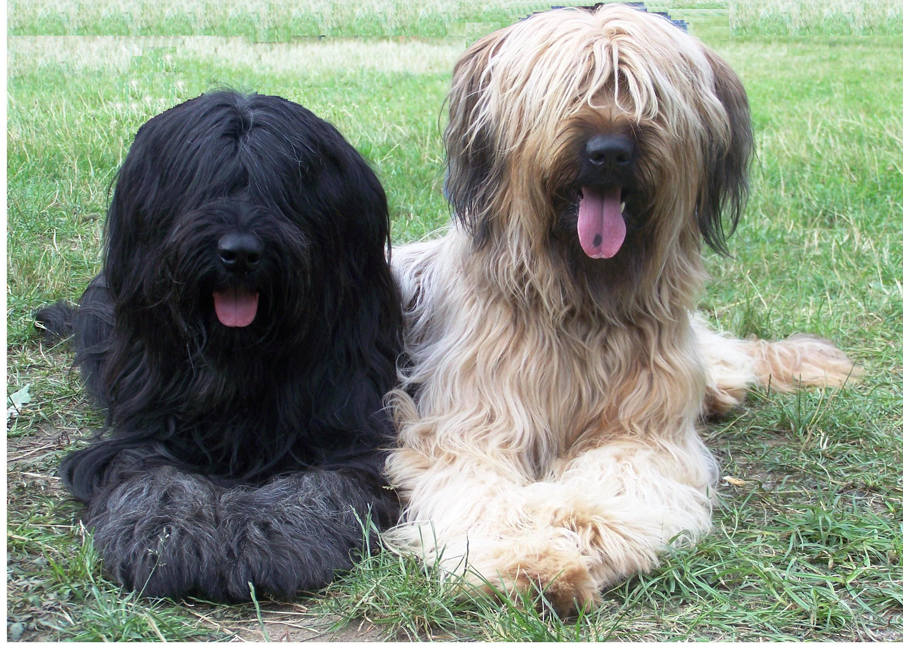 Zwart en Fauve reu